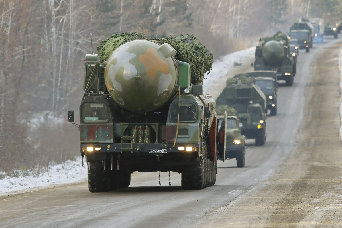 Полевой выход 29-й гвардейской ракетной Витебской дивизии.